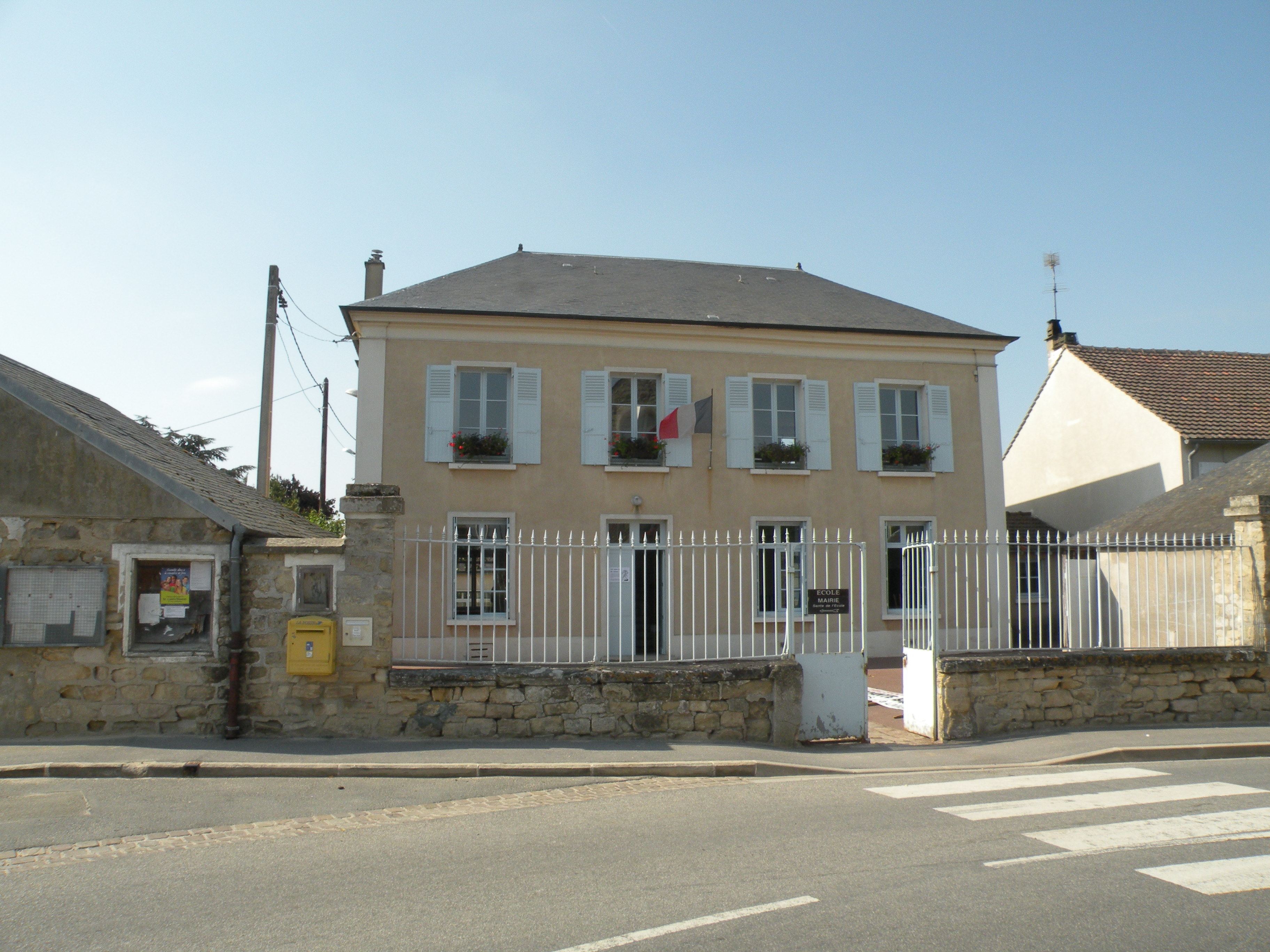 mairie de Livilliers